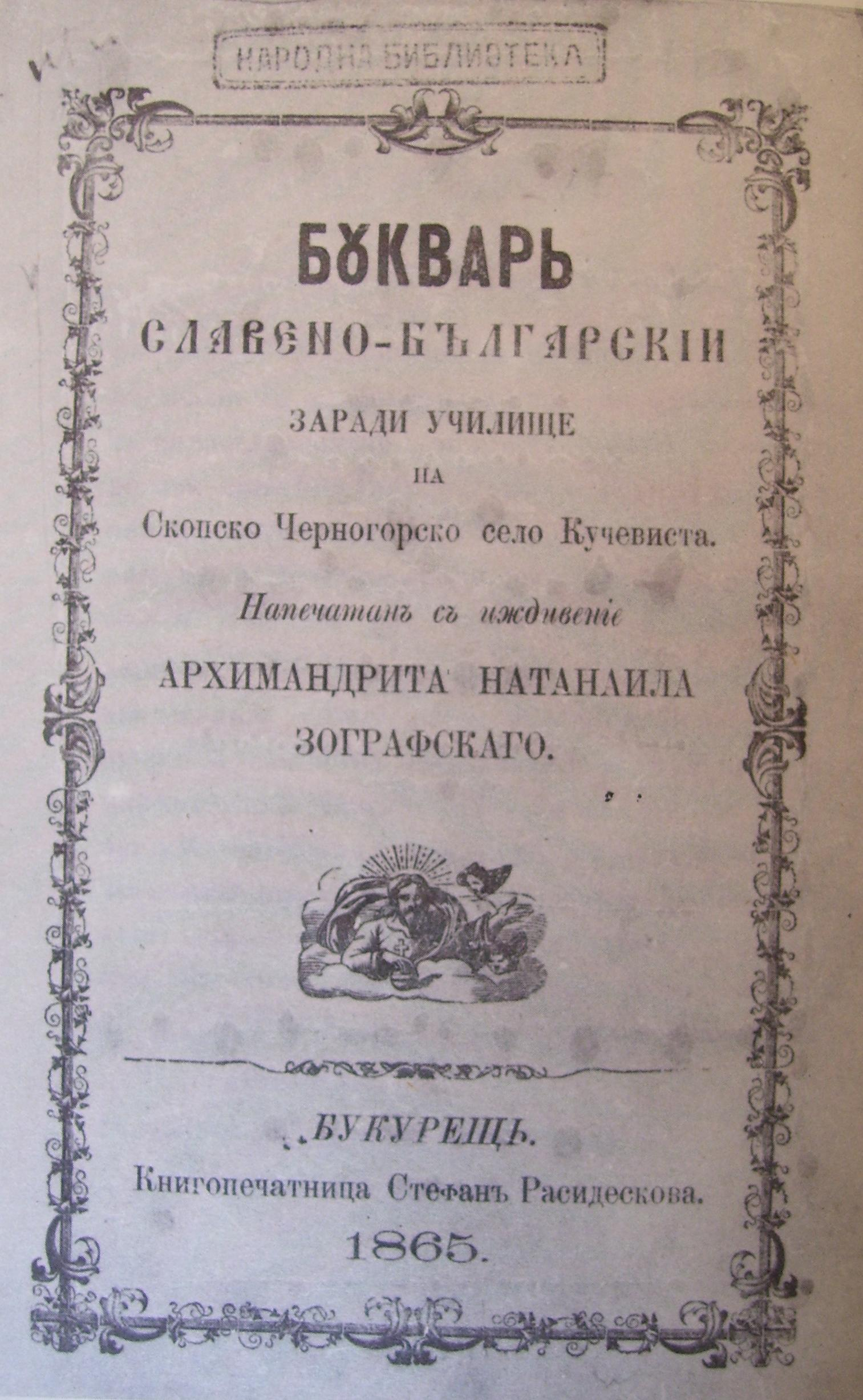 Заглавна страница на "Кратко изяснение на Божествената литургия" на Натанаил Охридски